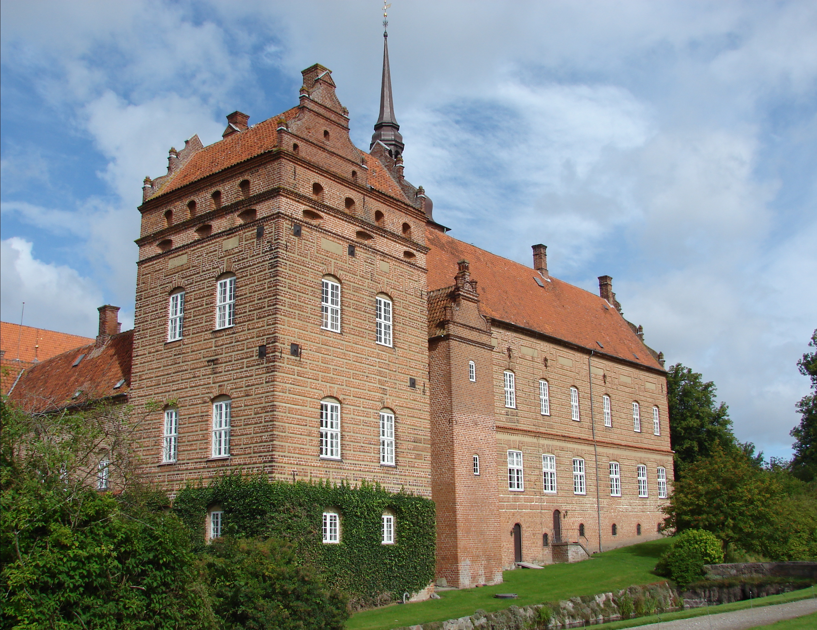 Holckenhavn Slot, Fyn